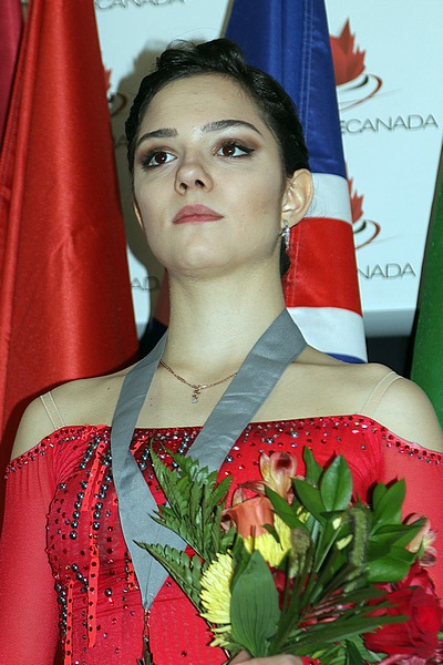 Евгения Медведева на Autumn Classic International 2018 - Подиум